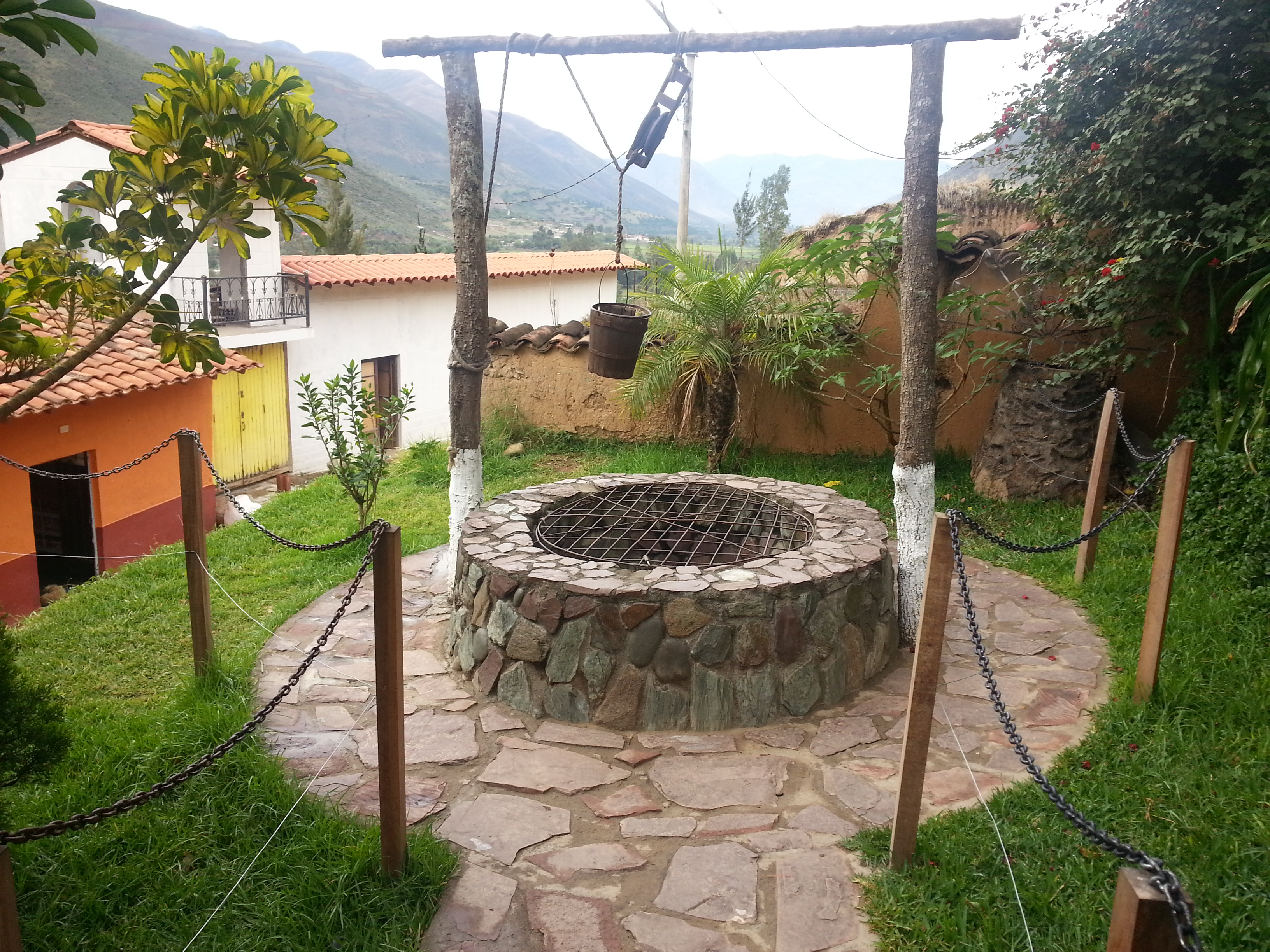 Adyacente a la casa, un pozo de agua de uso familiar,donde algunas personas han arrojado monedas.